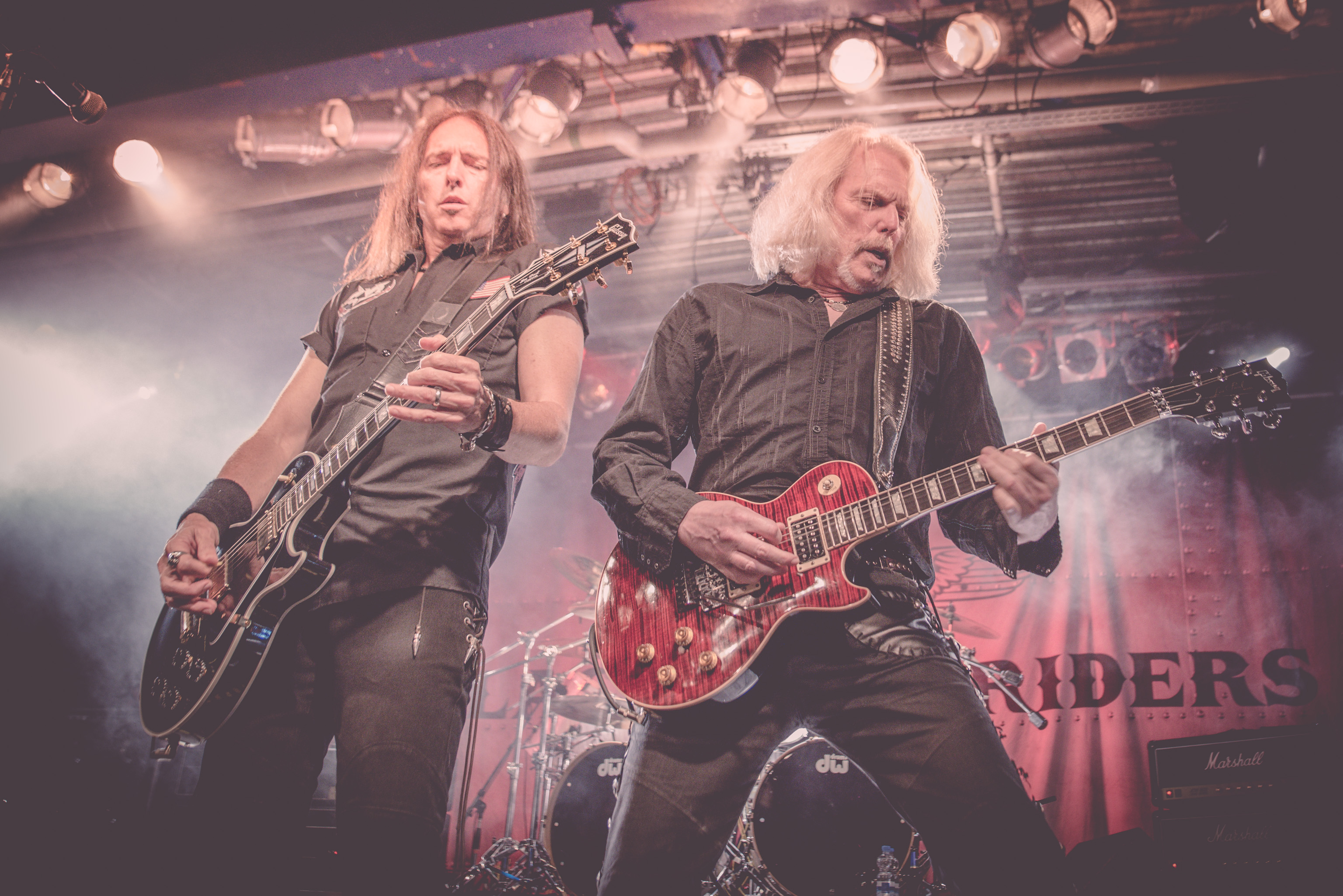 de